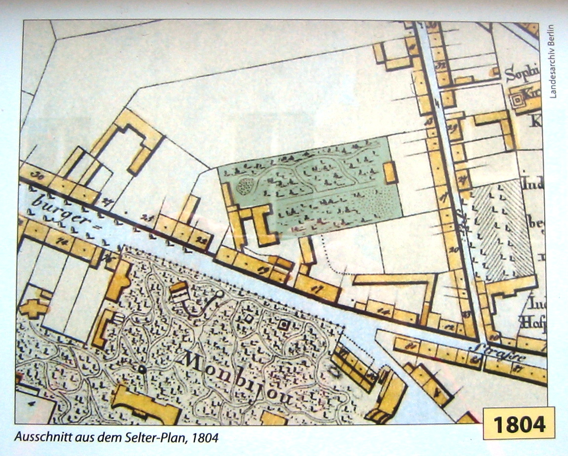 Selter-Plan 1804 zum Krausnickpark in Berlin-Mitte